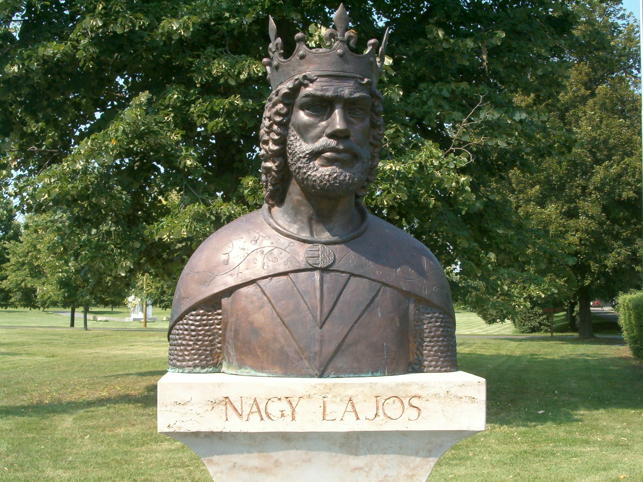 Nagy Lajos király Nemzeti Történeti Emlékpark / National Historical Memorial Park in Ópusztaszer, Hungary (Vanyúr István alkotása) self shot photo (2005), Váradi Zsolt